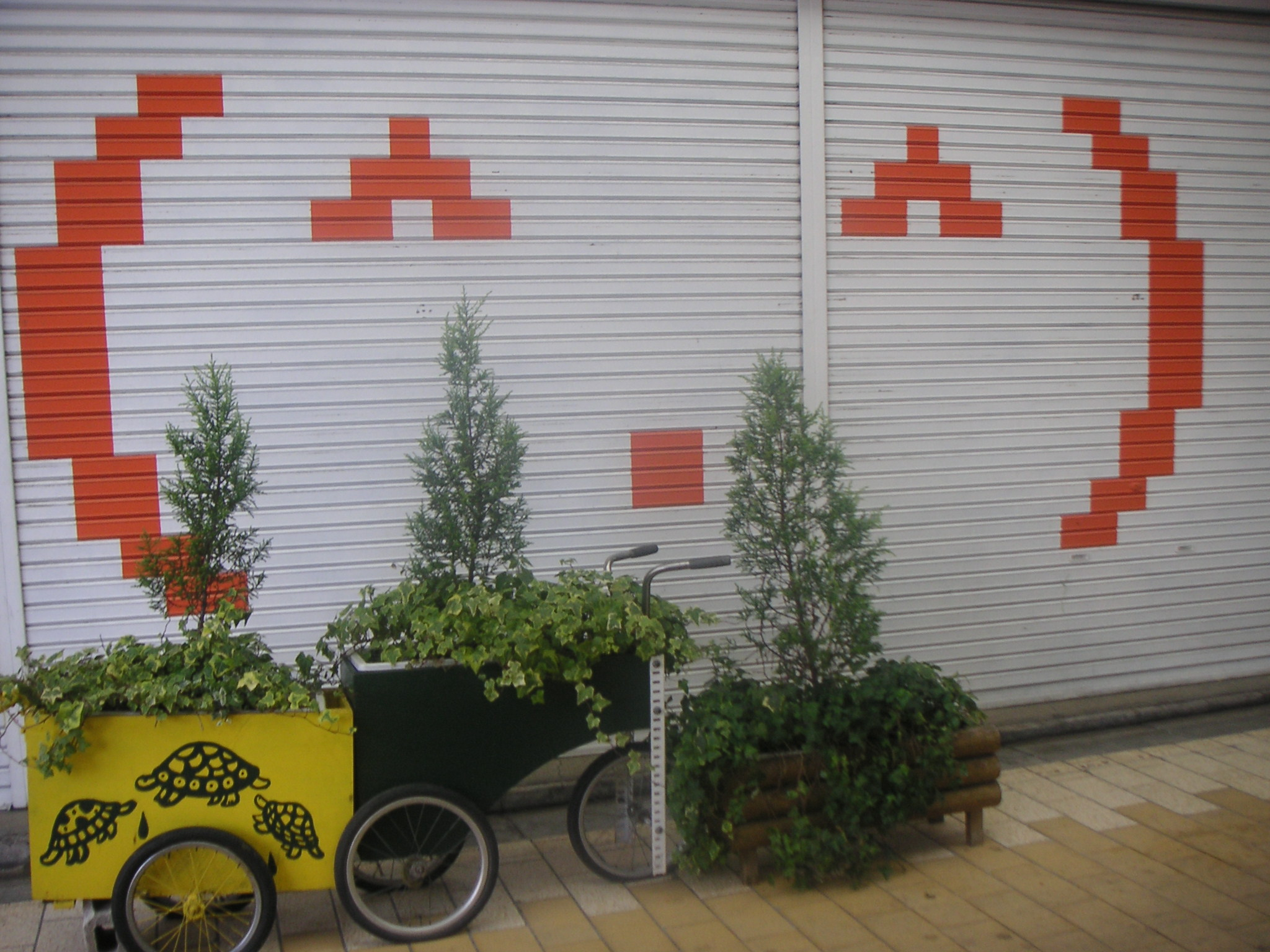 Sanja Shopping Mall